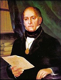 Anónimo: Andrés Bello. Oleo sobre tela. Casa de Bello. Caracas - Venezuela.